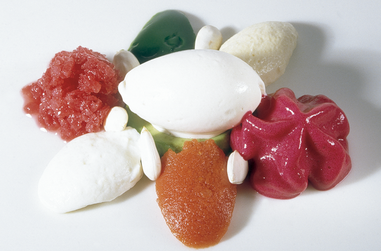 Menestra de verdures: Plat al menú del 1989 al restaurant ElBulli